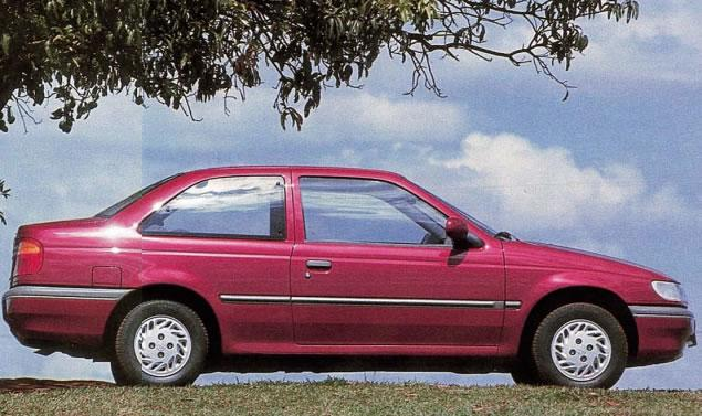 Fotografía de un Volkswagen Logus, versión sedán del Volkswagen Pointer.